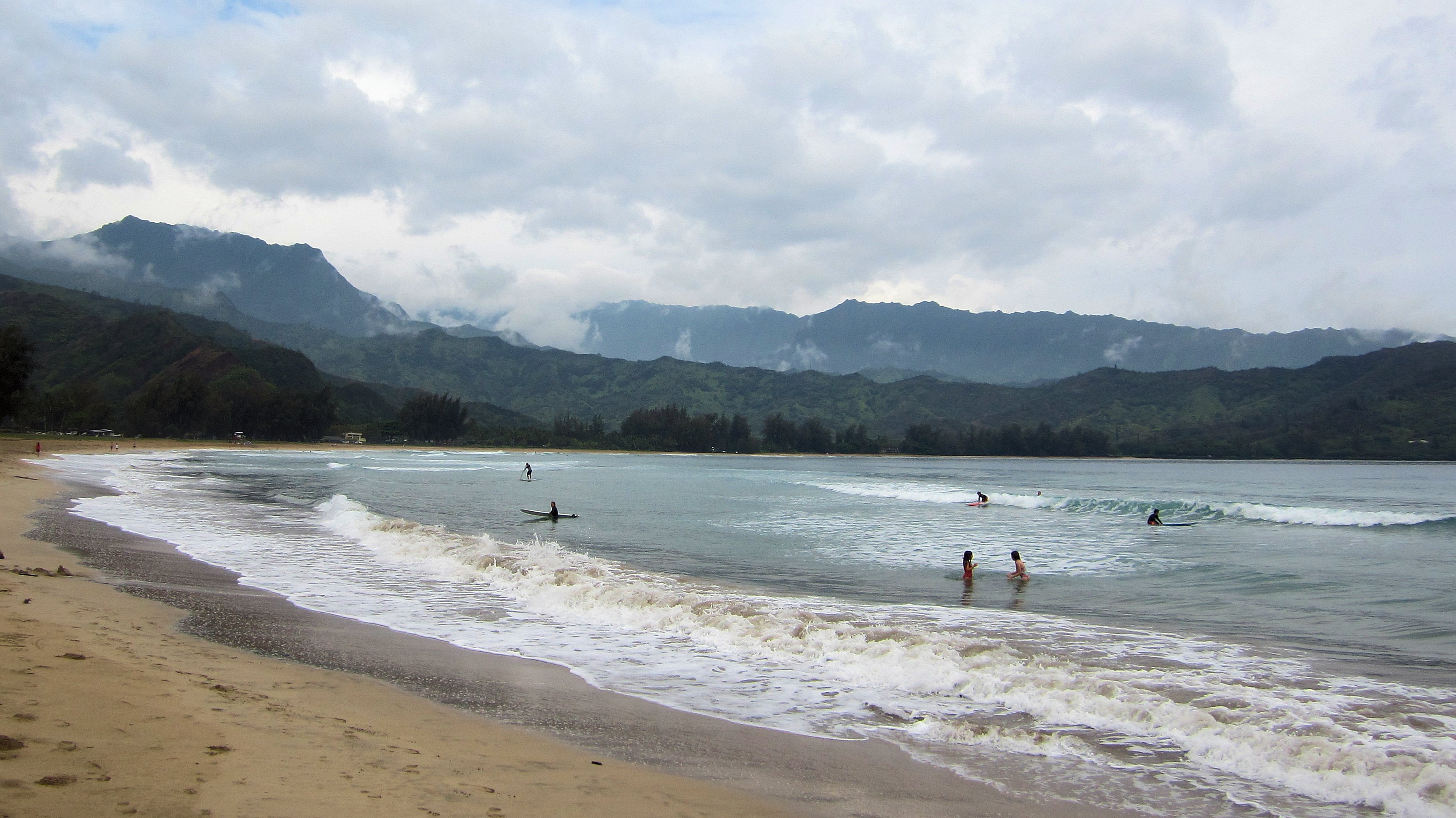 Die Aufnahme zeigt die Hanalei Bucht im Norden Kauais